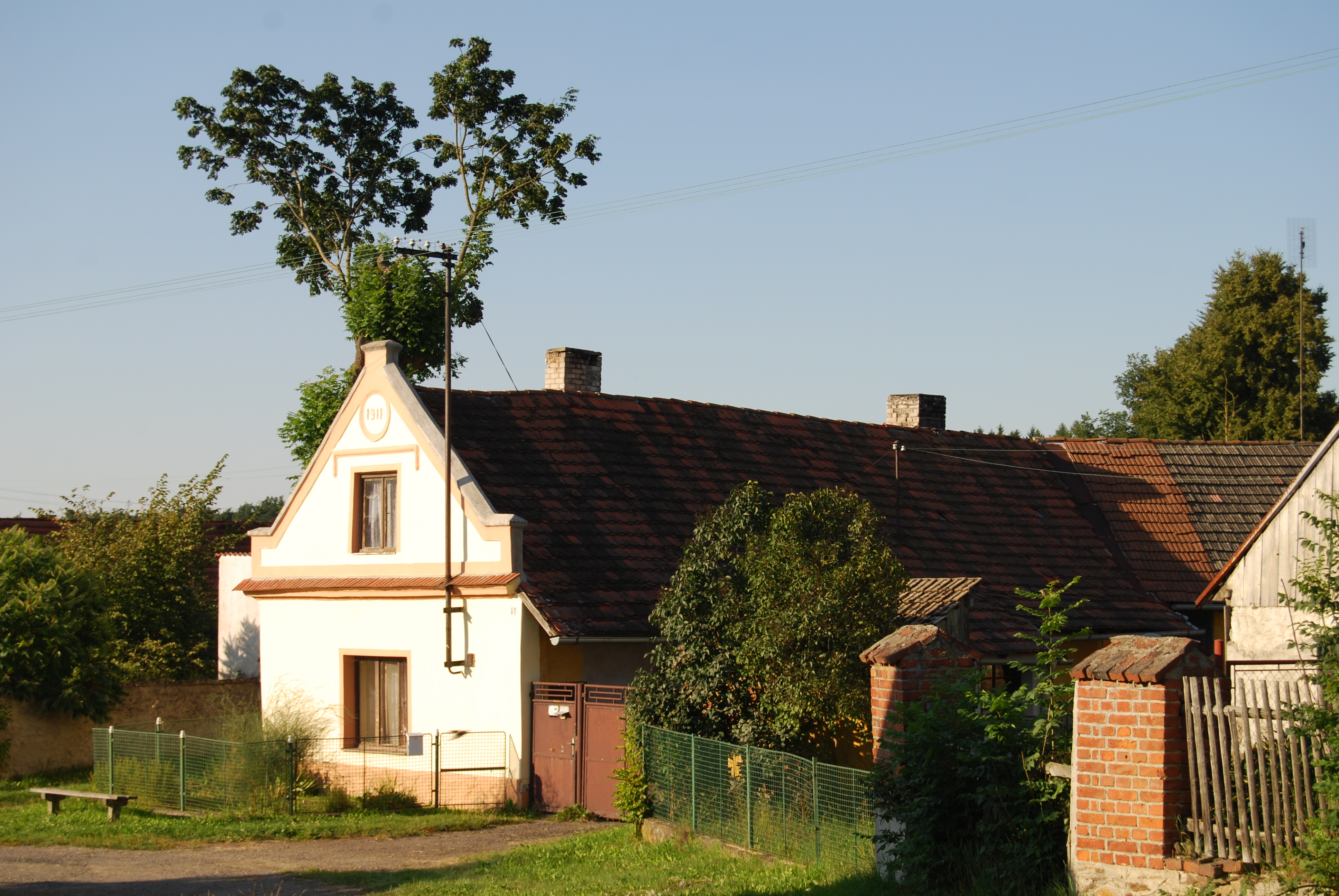 Stavení v obci. Zálší je část městyse Sepekov v okrese Písek. Česká republika.